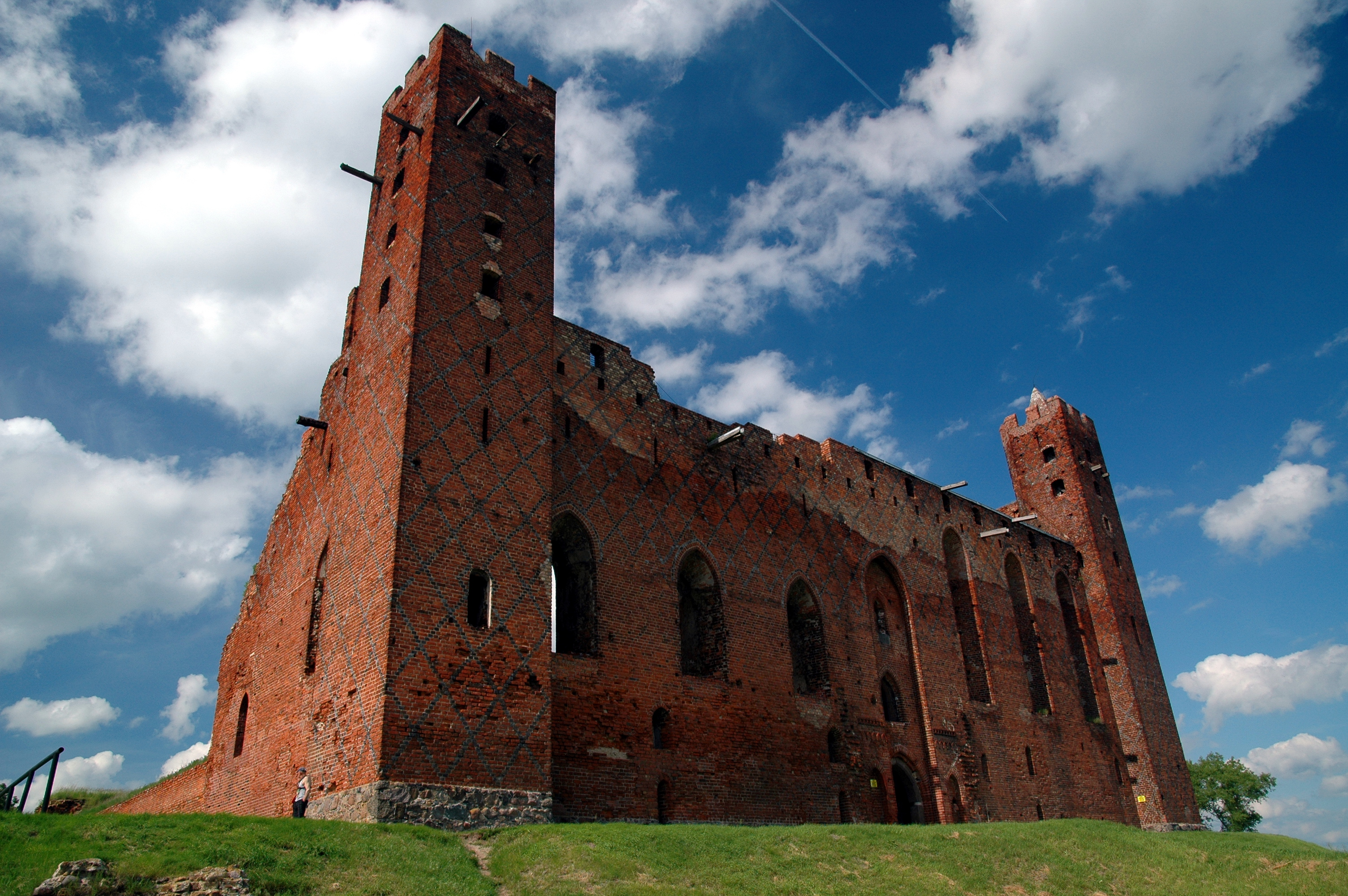 Zamek w Radzyniu Chełmińskim